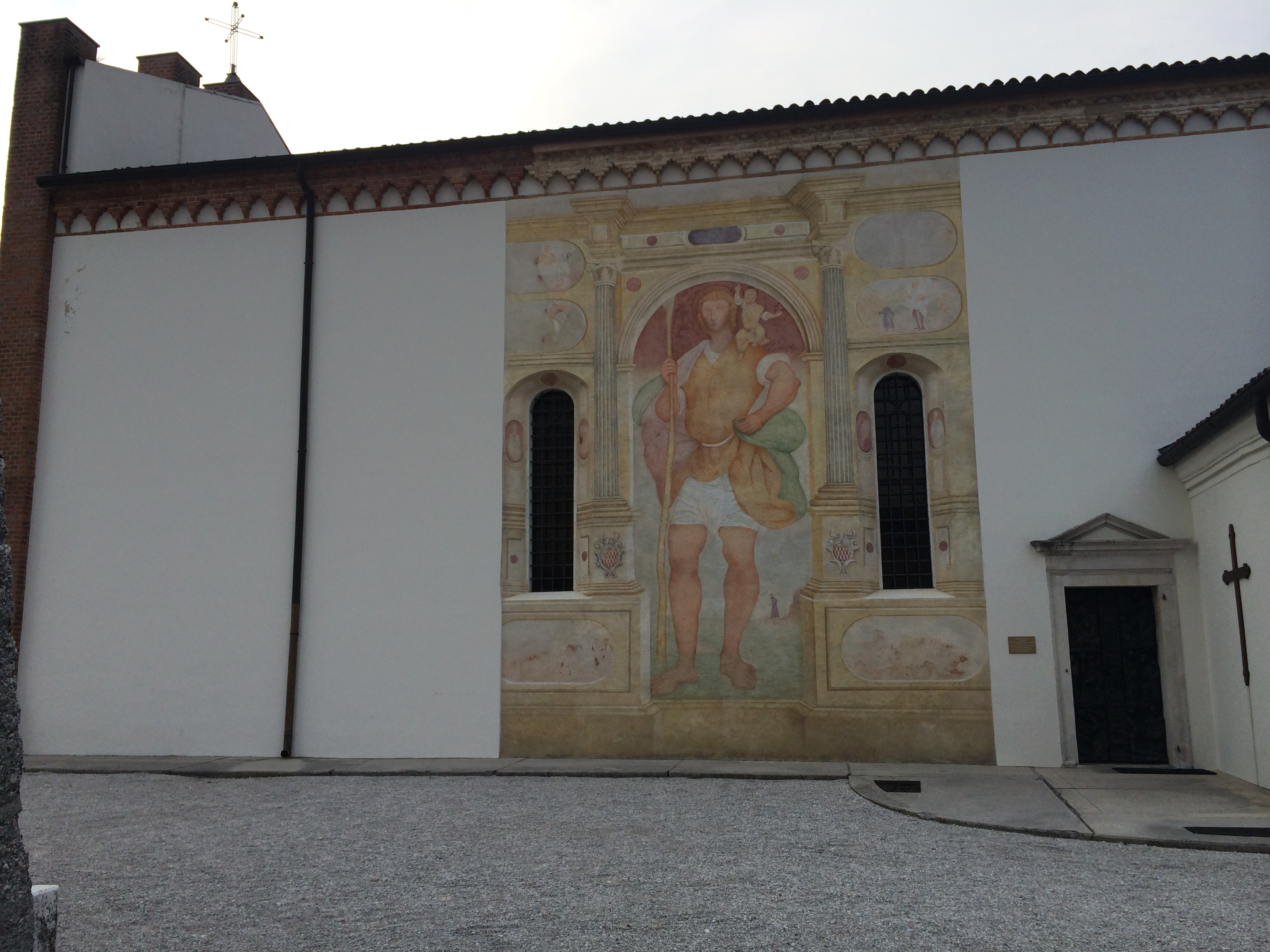 Tauriano - Chiesa 02